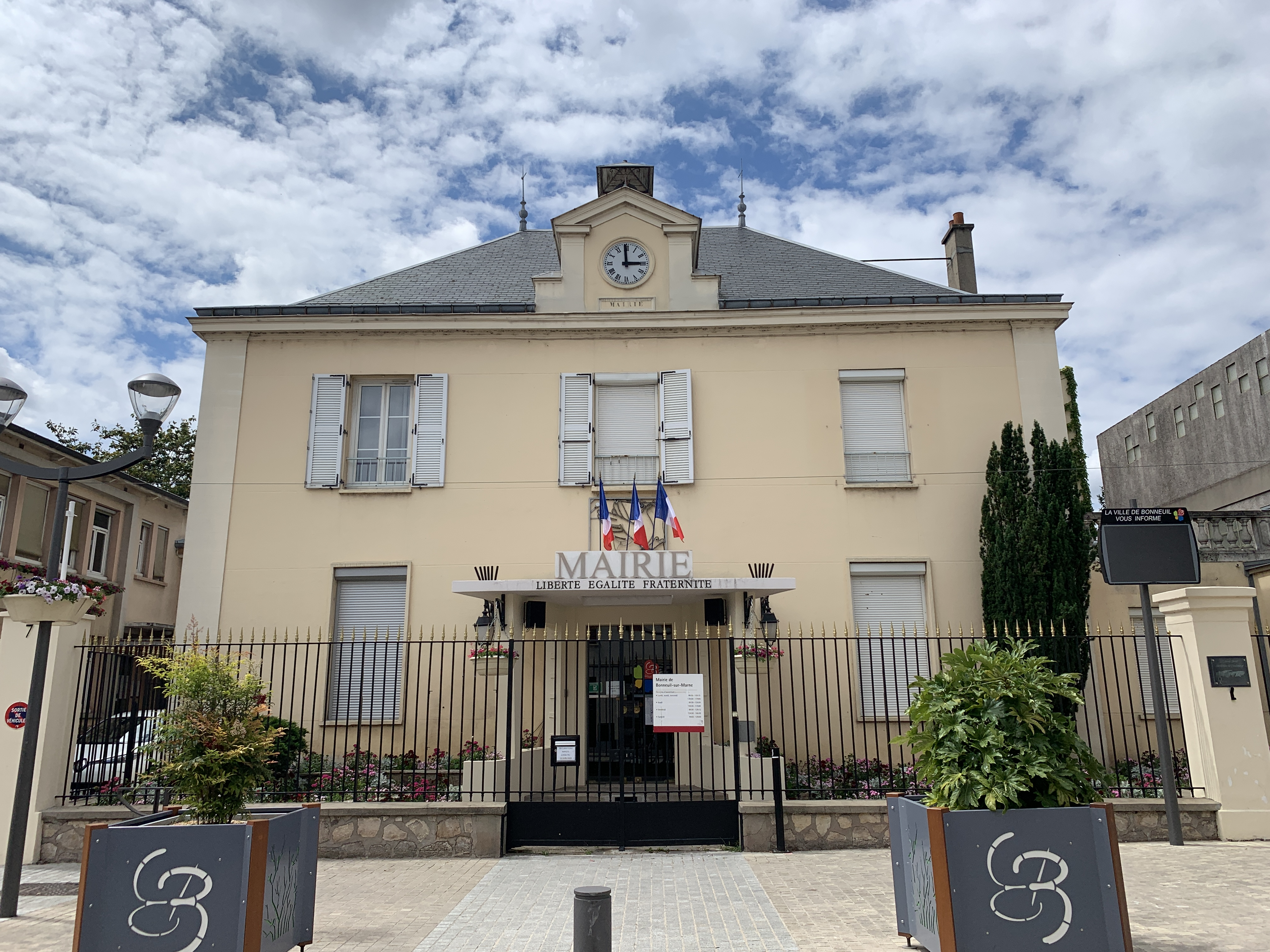 Mairie de Bonneuil-sur-Marne.